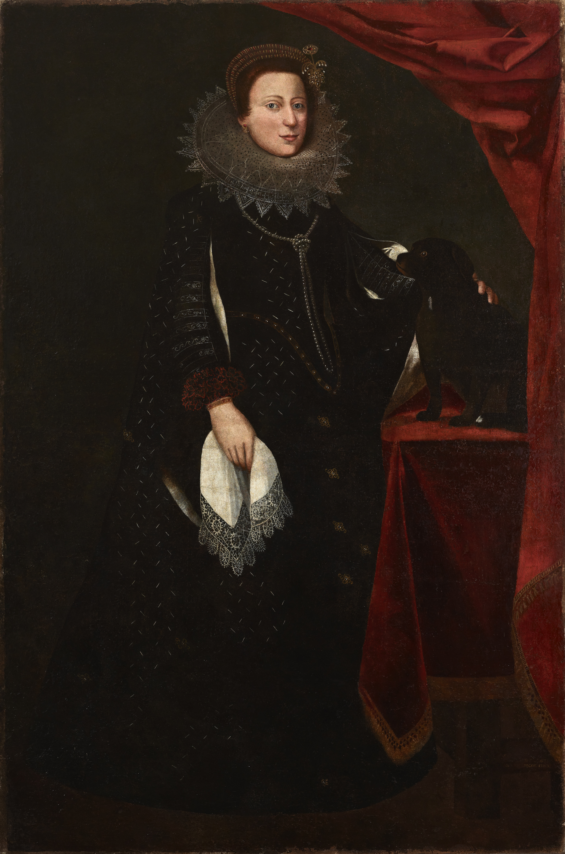 Ritratto di Camilla Faà Gonzaga